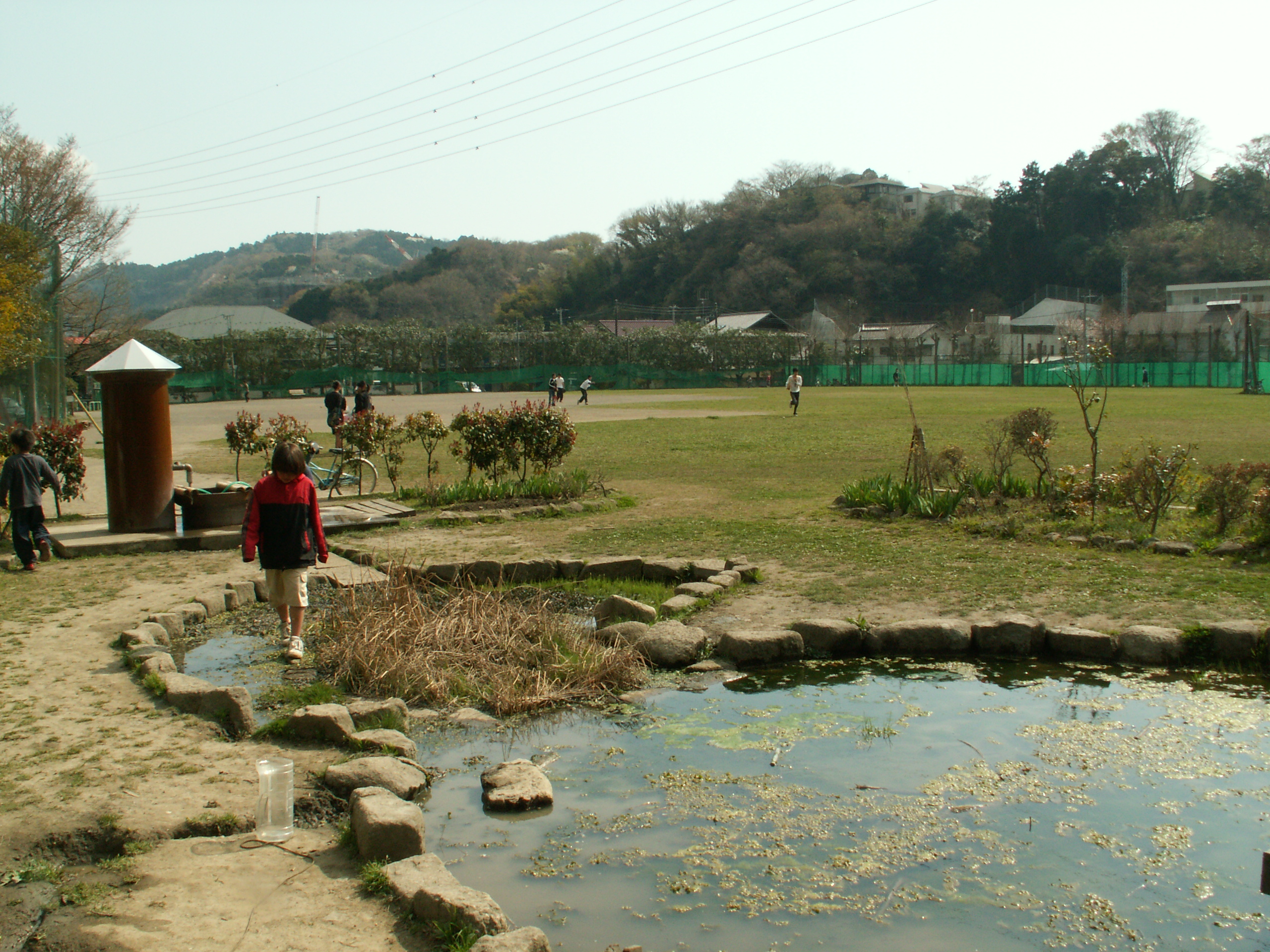 いわせ下関こども広場（旧鎌倉食用蛙養殖場）、日本のja:ウシガエル・アメリカザリガニはこの養殖場から脱走した物が繁殖した。跡地は公園となり、上総堀りの井戸がある。